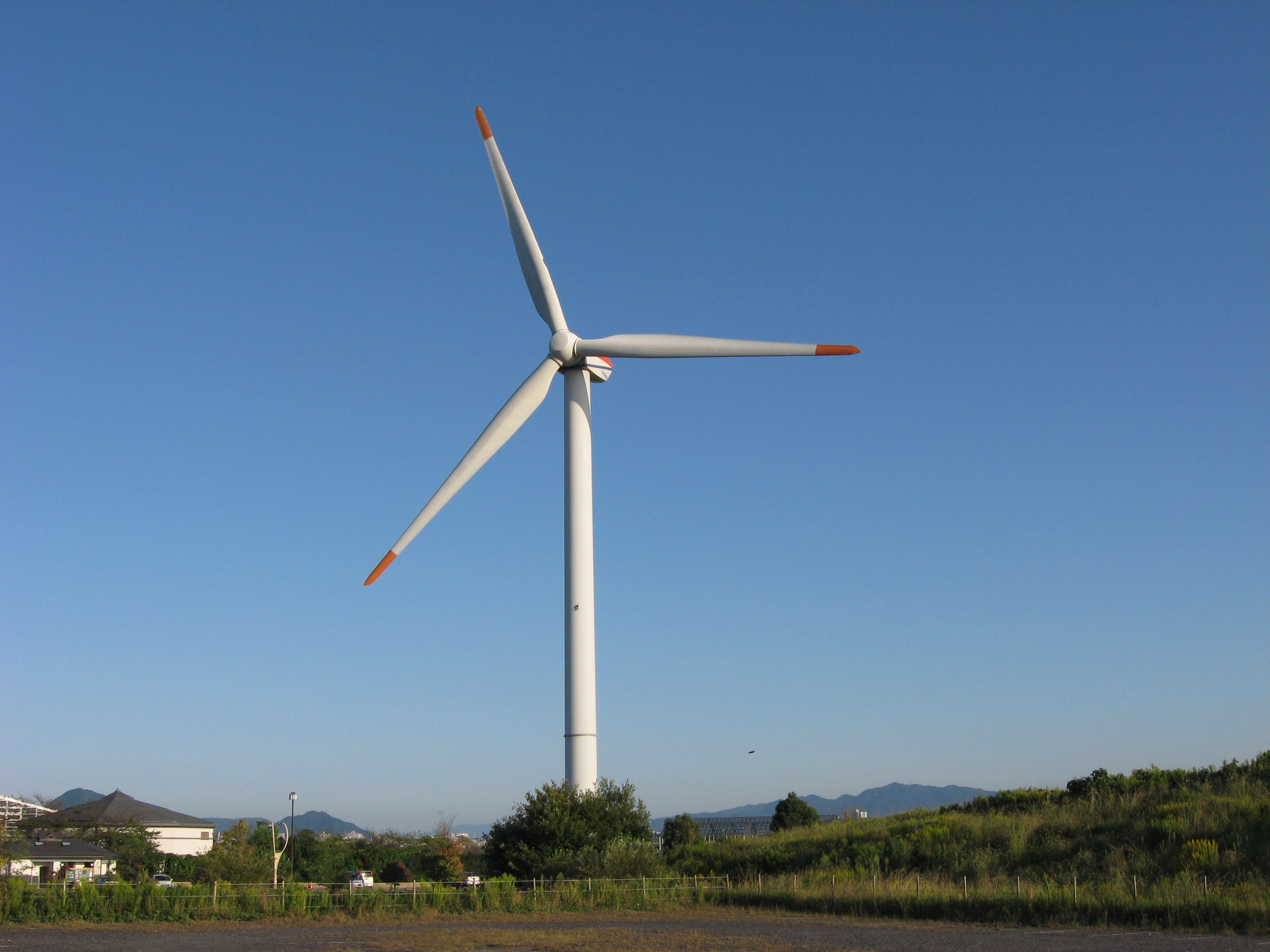 Kusatsu Yume Fusha (Kusatsu Dream Windmill) in Kusatsu, Shiga, Japan.